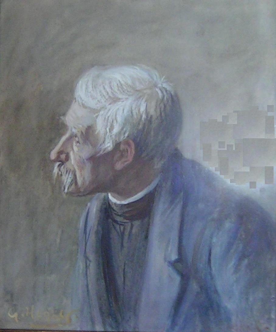 Self-portrait